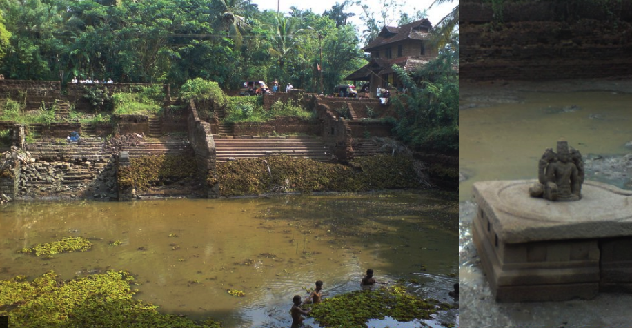 നെടുമ്പുര ക്ഷേത്രക്കുളവും ക്കുളത്തിലെ തേവരും